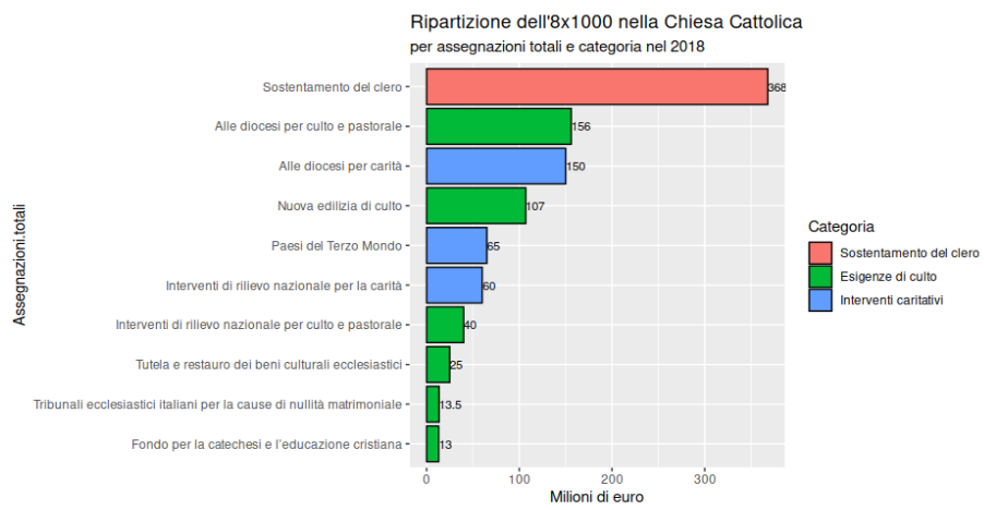 file realizzato con RStudio con dati presi dal seguente file